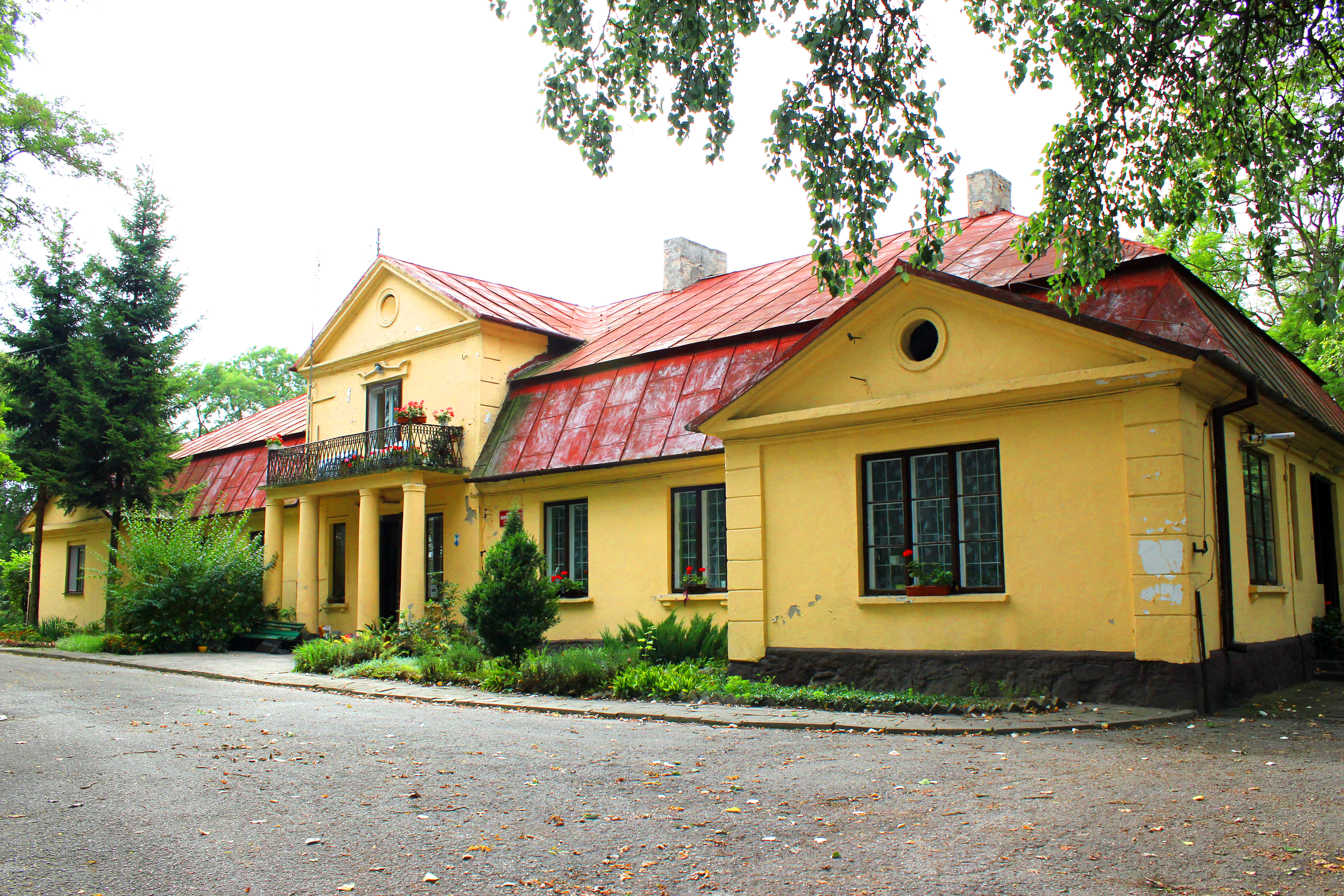 Płowce - zespół dworski: dwór, 1759, ok. 1860; park, XVIII